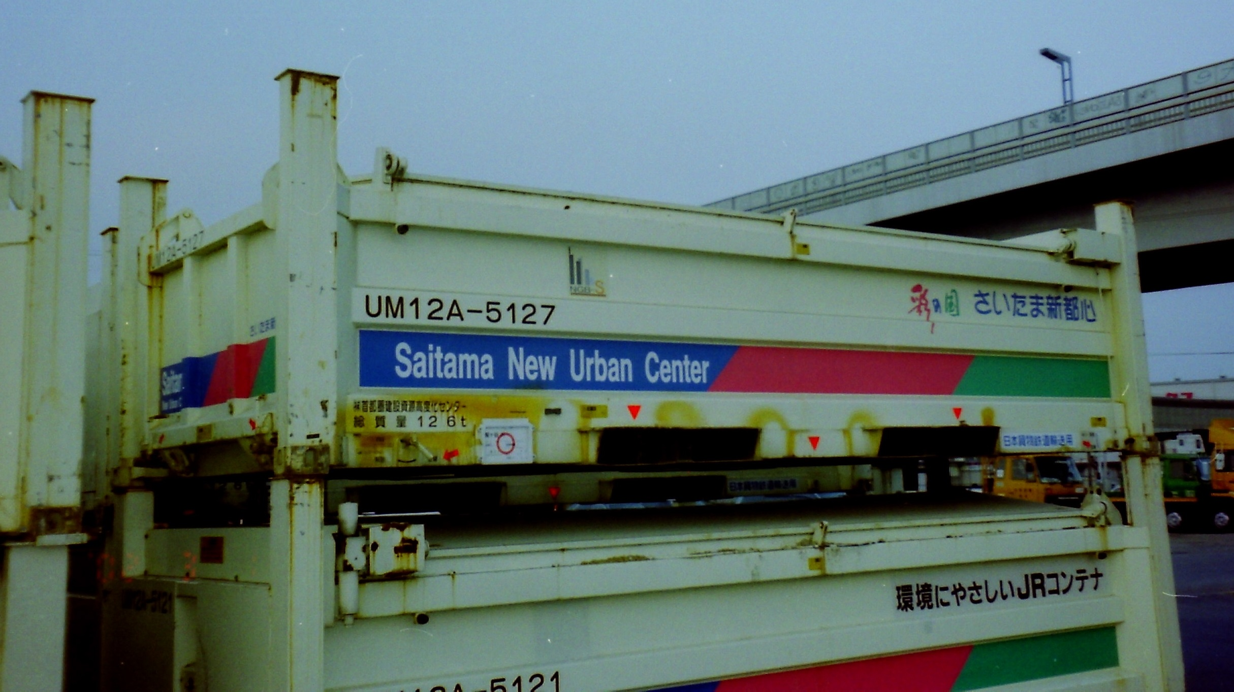 JR貨物より日本国内での鉄道輸送用に承認登録されて、民間企業が所有及び使用している 「 鉄道私有コンテナ 」 。 撮影地＝【埼玉／越谷(タ)】